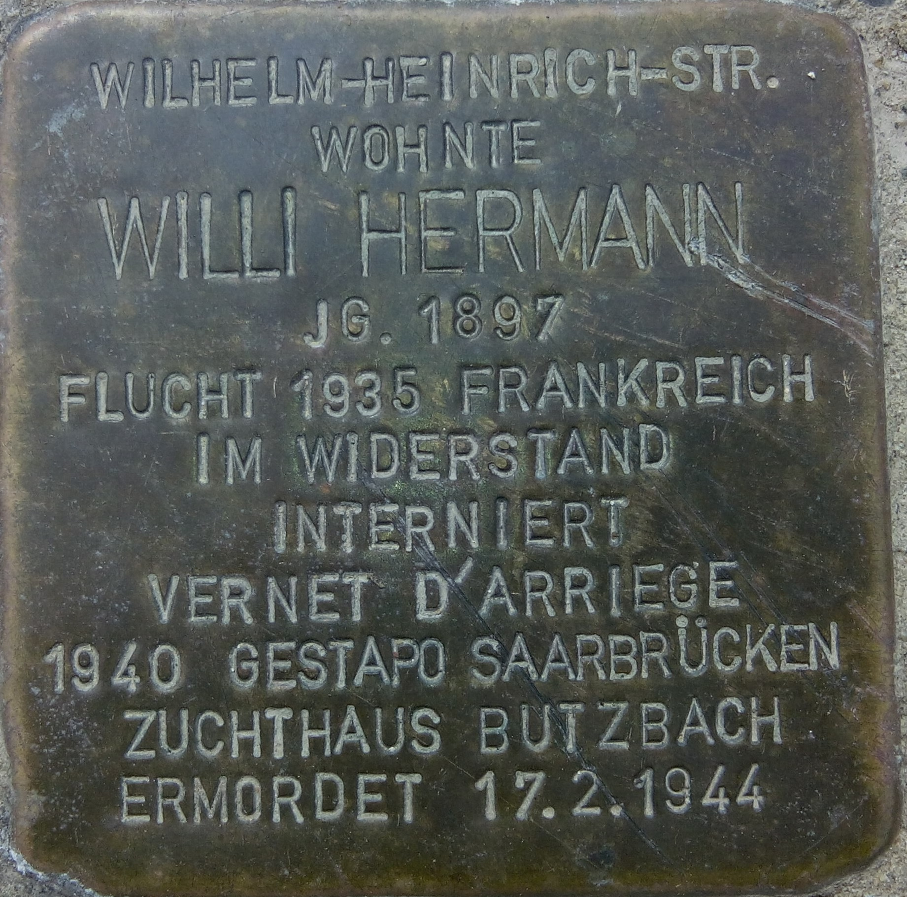 Stolperstein von Willi Hemann